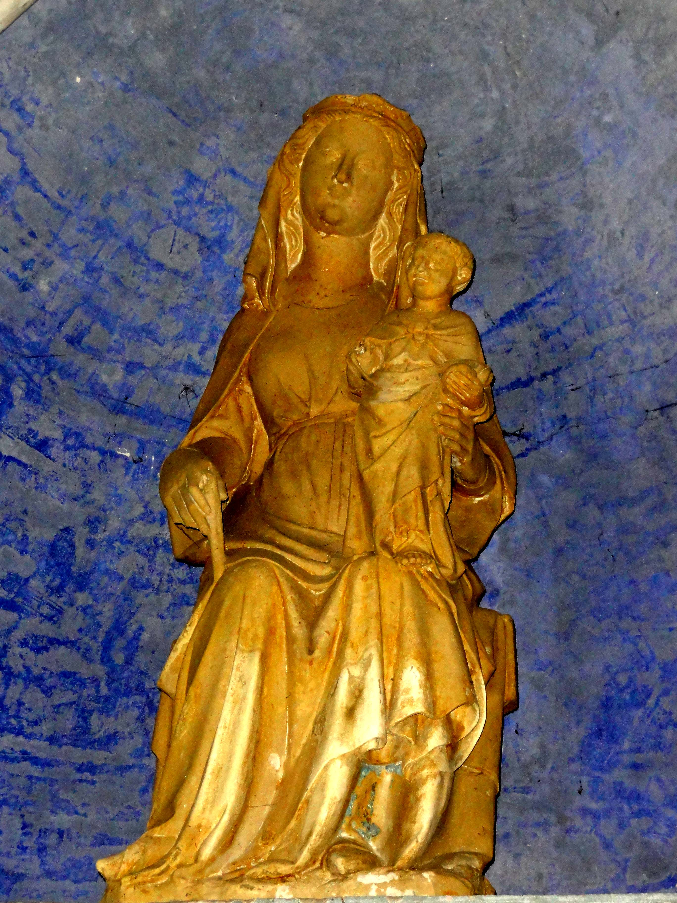 Vierge à l'Enfant assise, XIVe siècle.